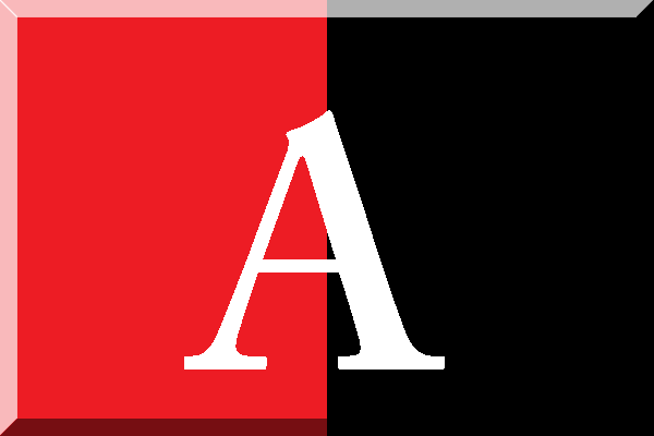 Bandera de Atlas de Guadalajara